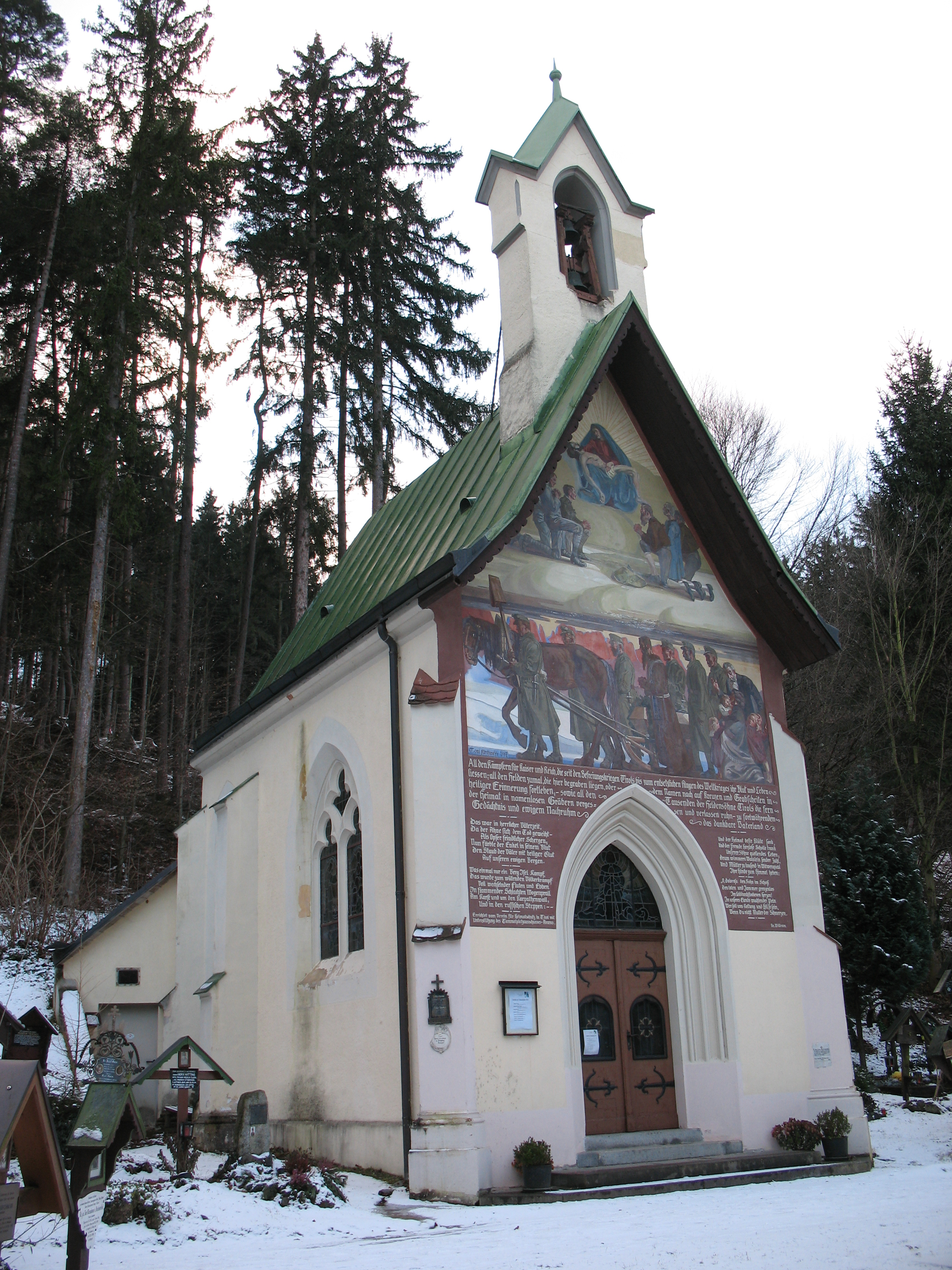 Kreuzkapelle (Jubiläumskapelle bzw. Kreuzwegkapelle)